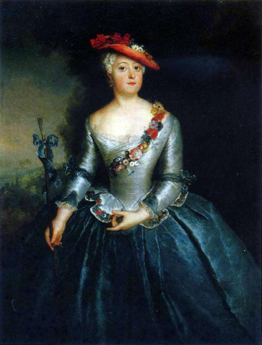 Prinzessin Luise Ulrike von Preußen als Schäferin